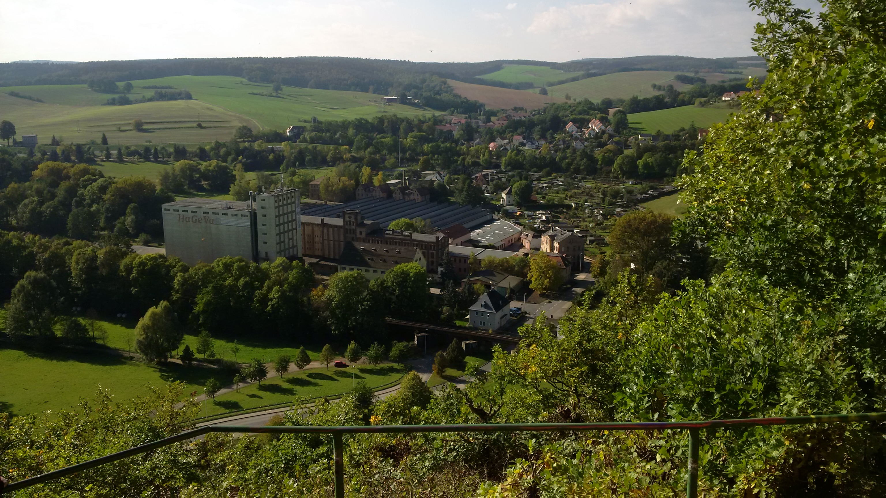 Blick vom Zoitzberg in das Elstertal und auf Röppisch